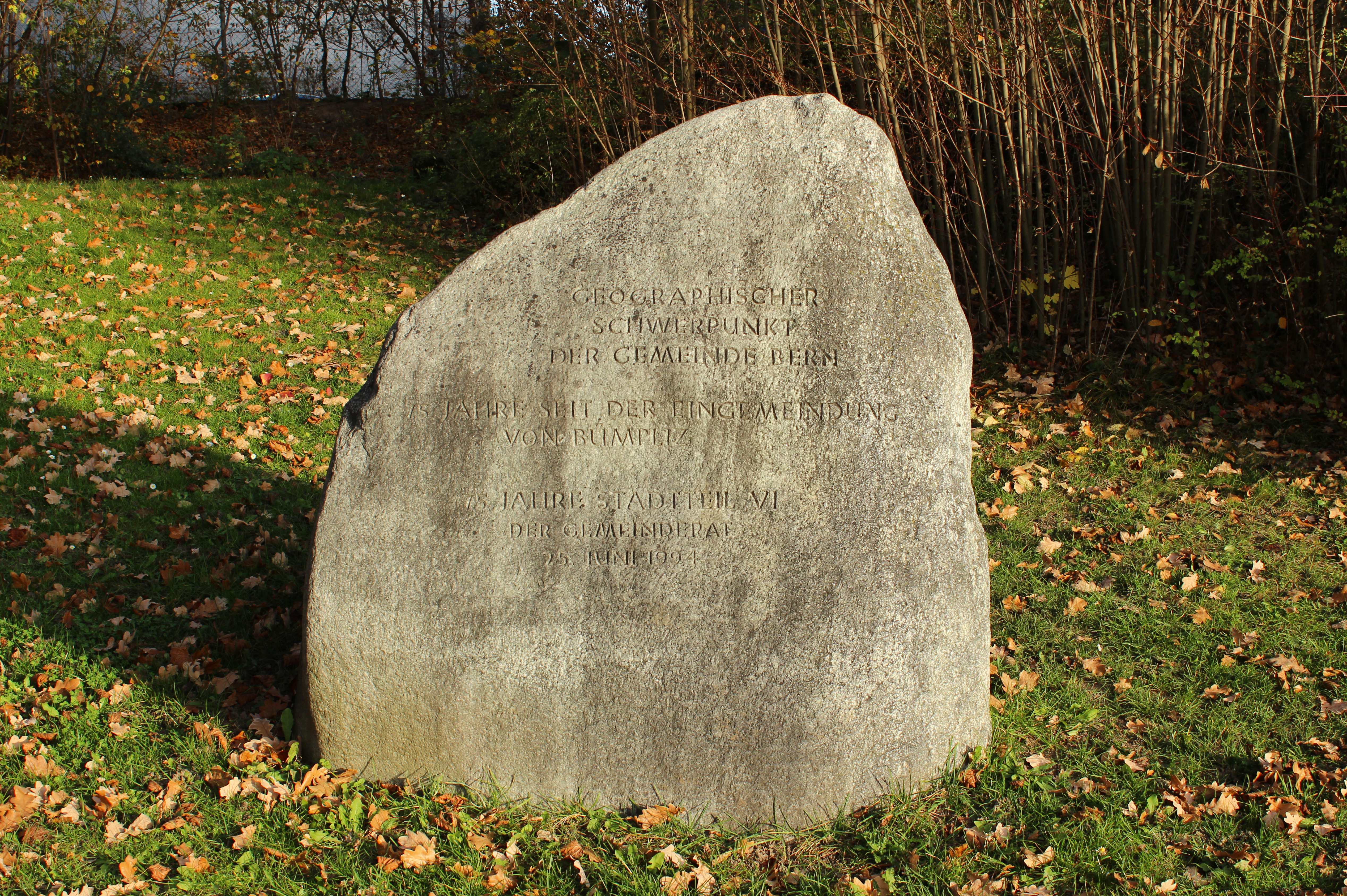 Stein am Ort des geographischen Schwerpunkts der Gemeindes Bern im Freibad Weyermannshaus.